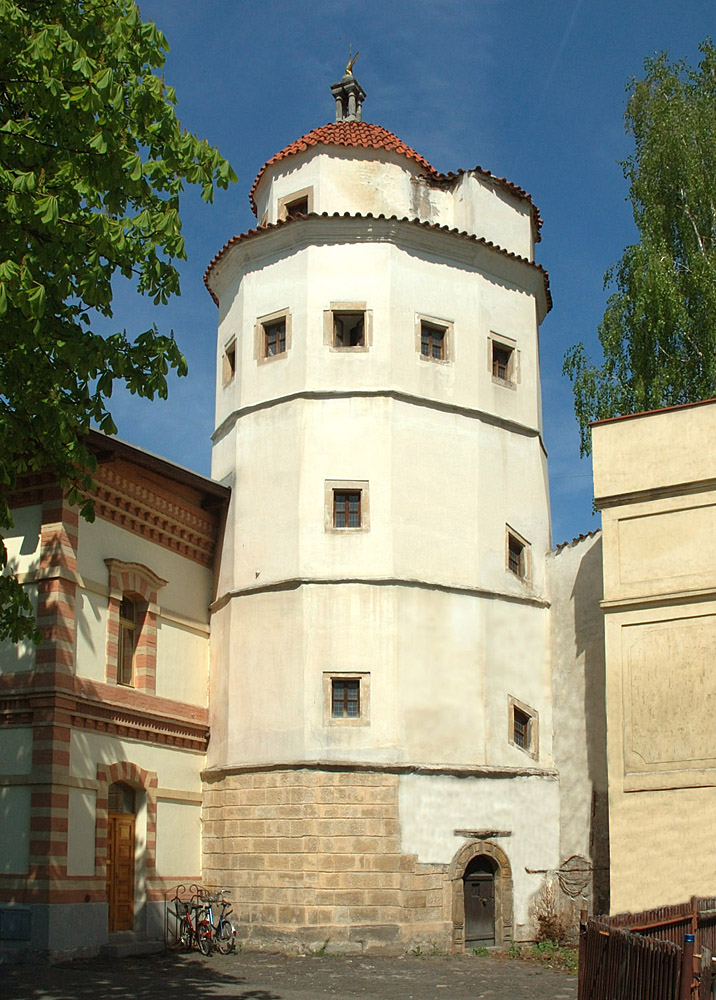 Turecká věž - renesanční vodárna